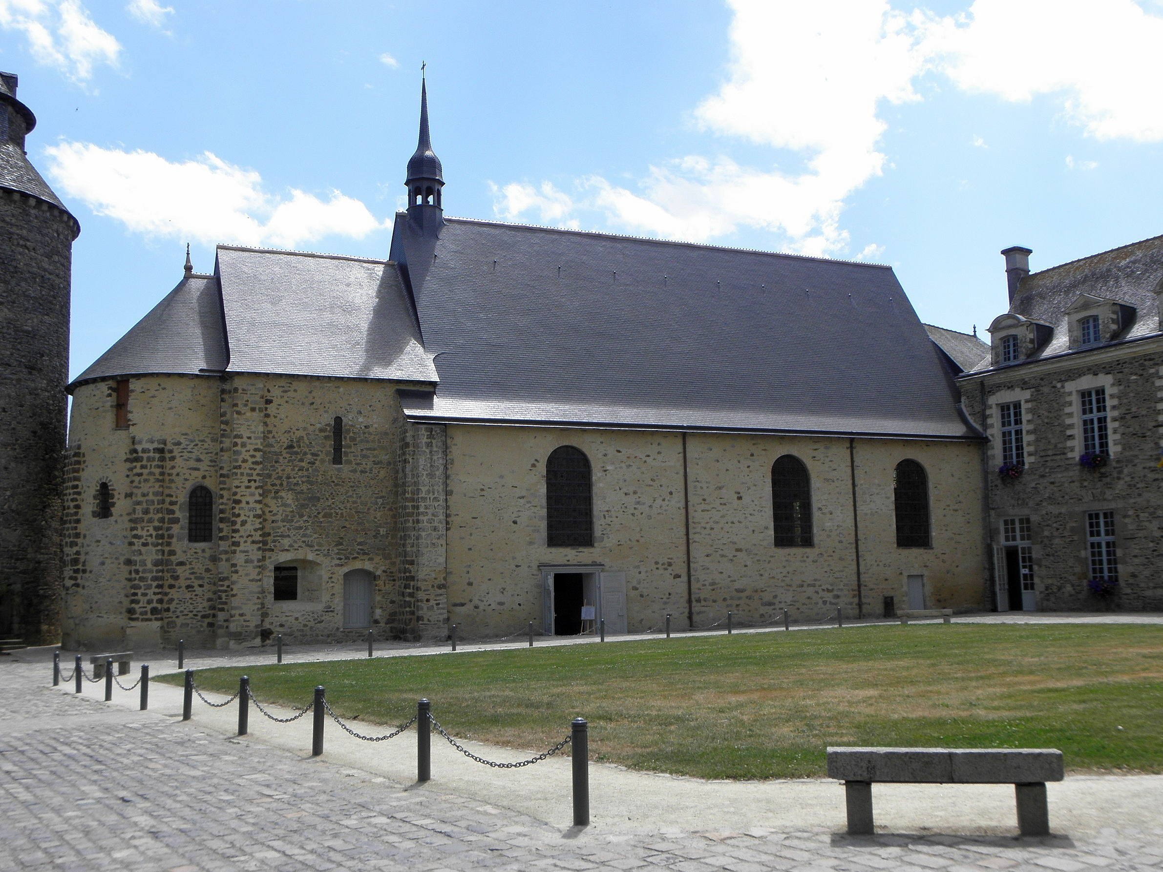 Extérieur de la chapelle Sainte-Marie-Madeleine du château de Châteaugiron (35).